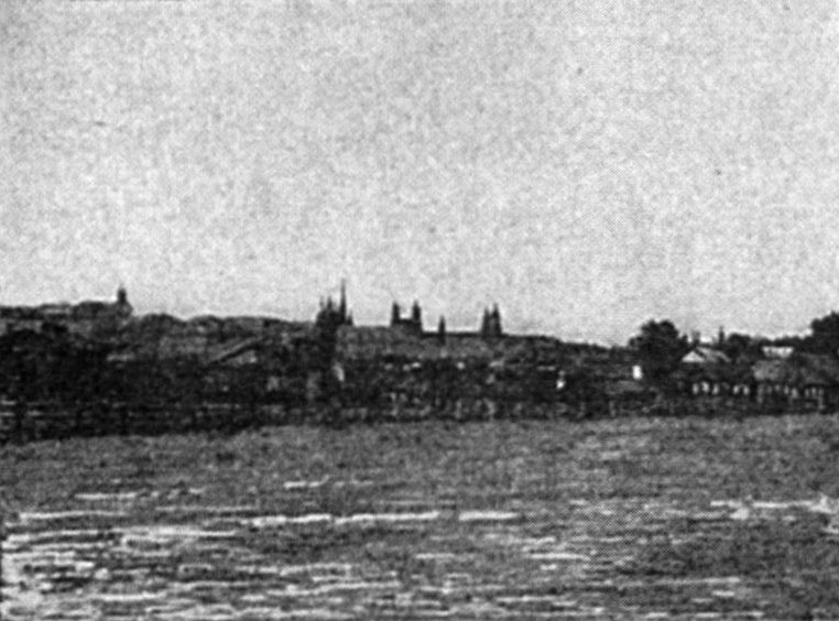 Беларуская (тарашкевіца): Менск (Miensk), Траецкая гара (Trajeckaja hara)